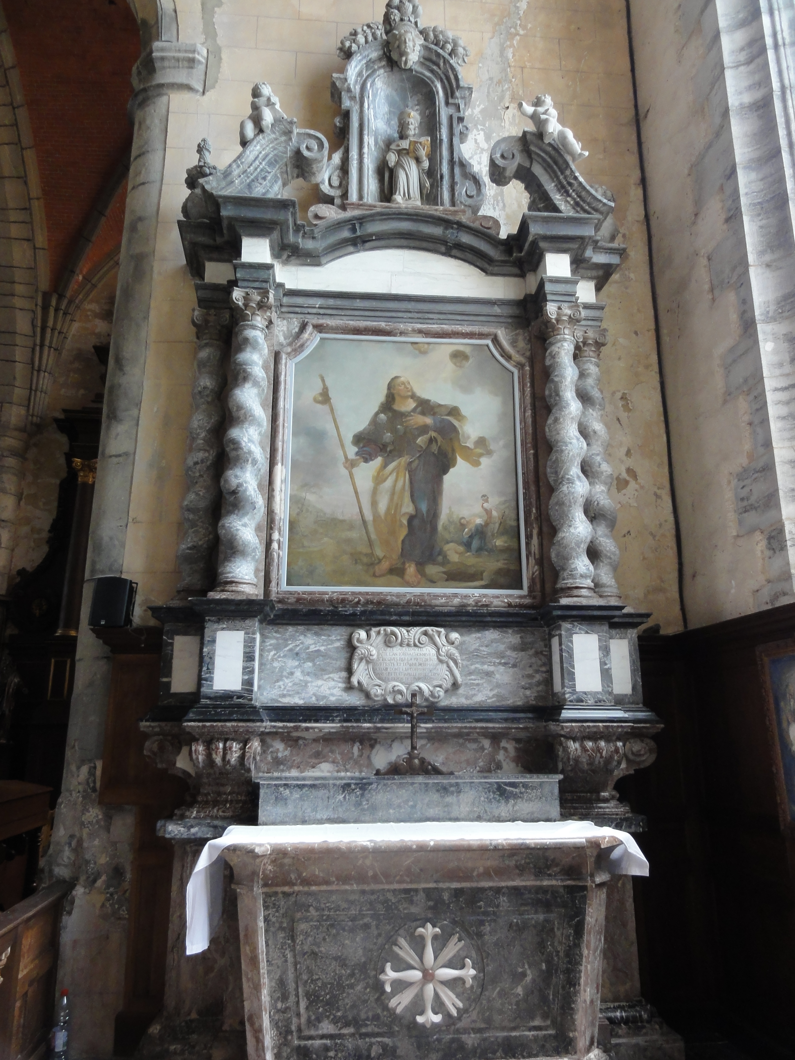 Solre-le-Château (Nord, Fr) église, l'autel de droite